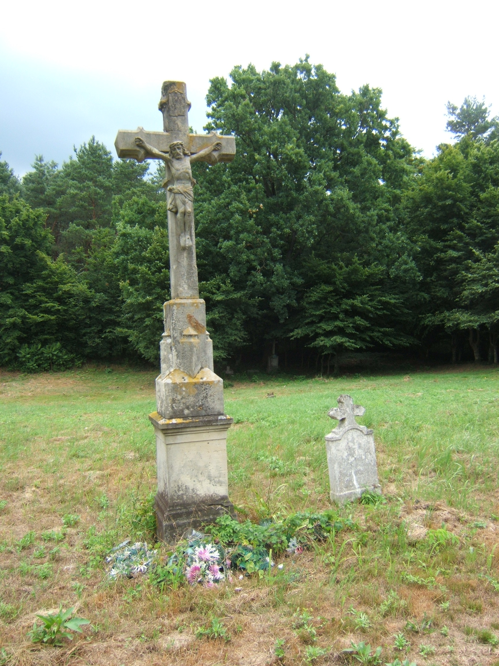 Zalakomár, ormándpusztai temetőkereszt